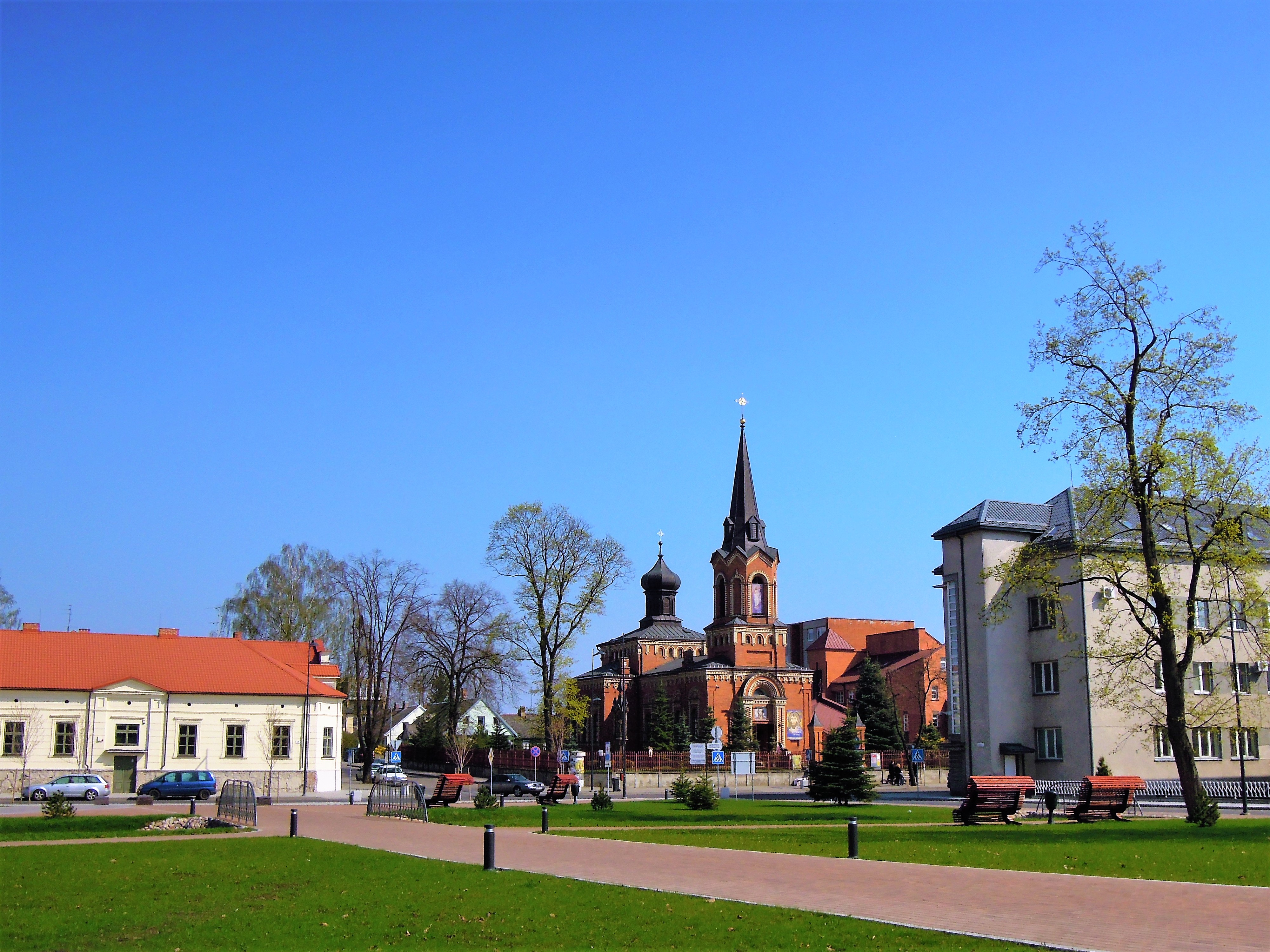 Marijampolė